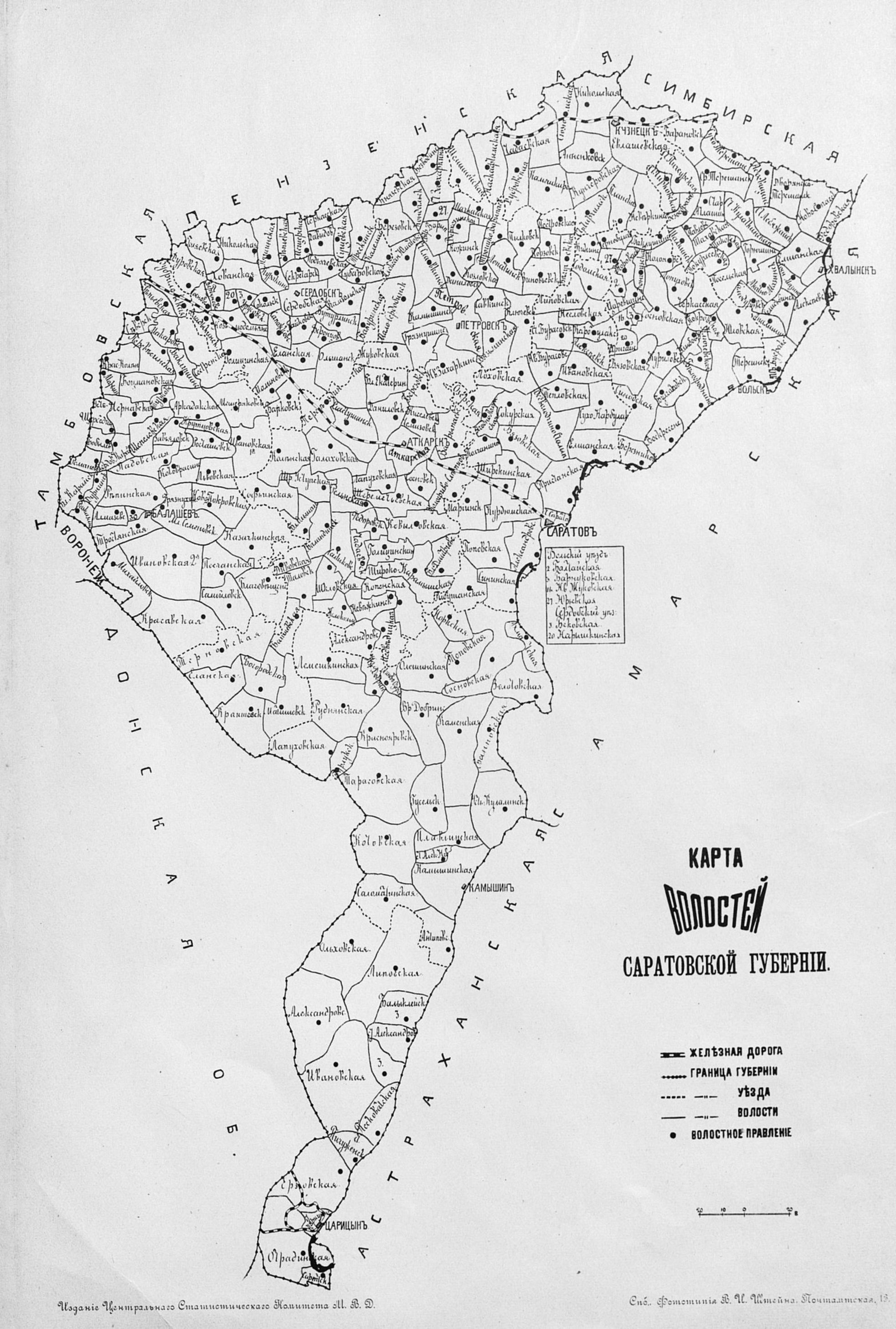 Карта волостей Саратовской губернии